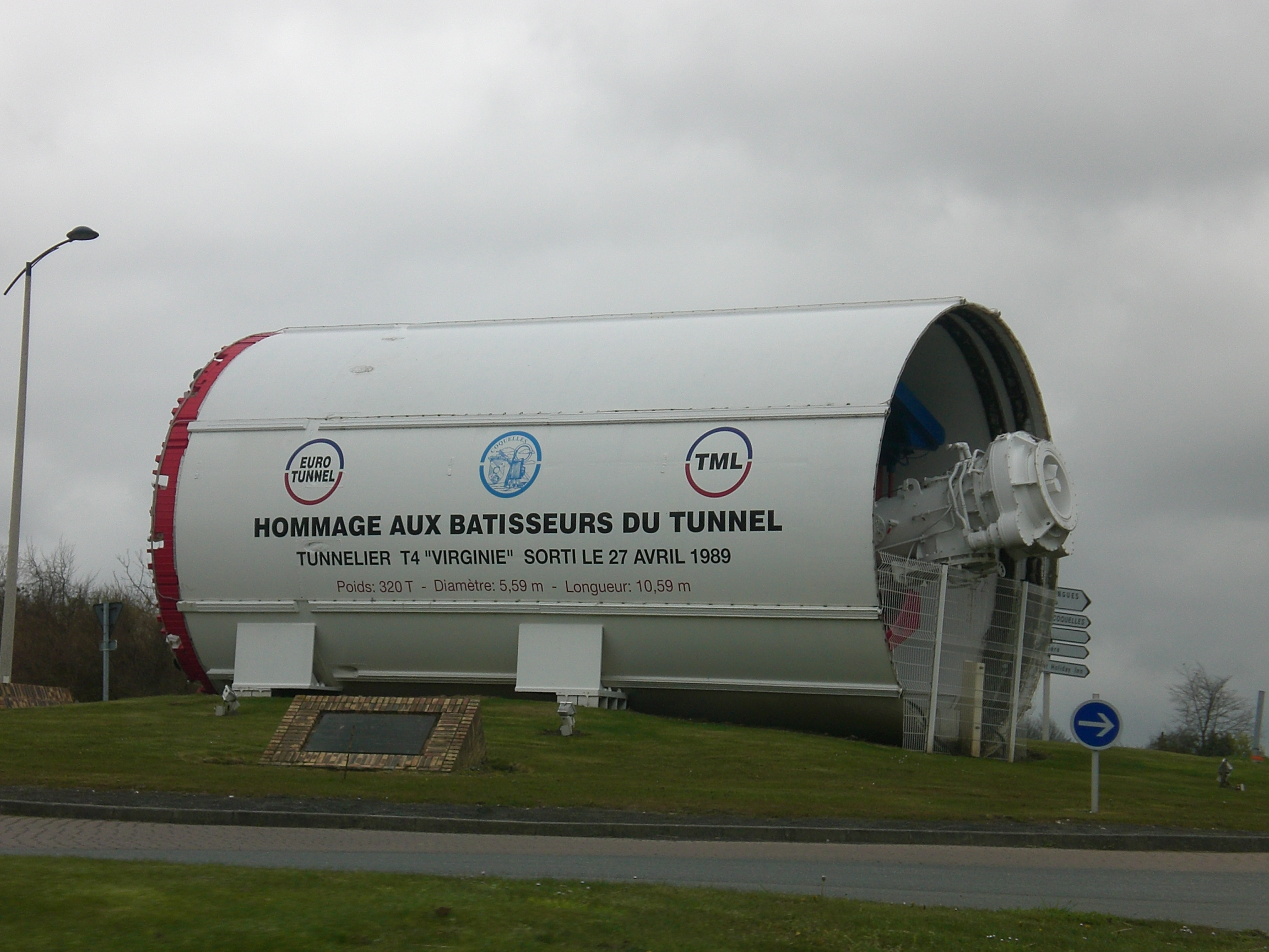 Un des tunnelier utilisé pour creuser le tunnel sous la Manche. Il est présent sur un rond-point à proximité du tunnel.